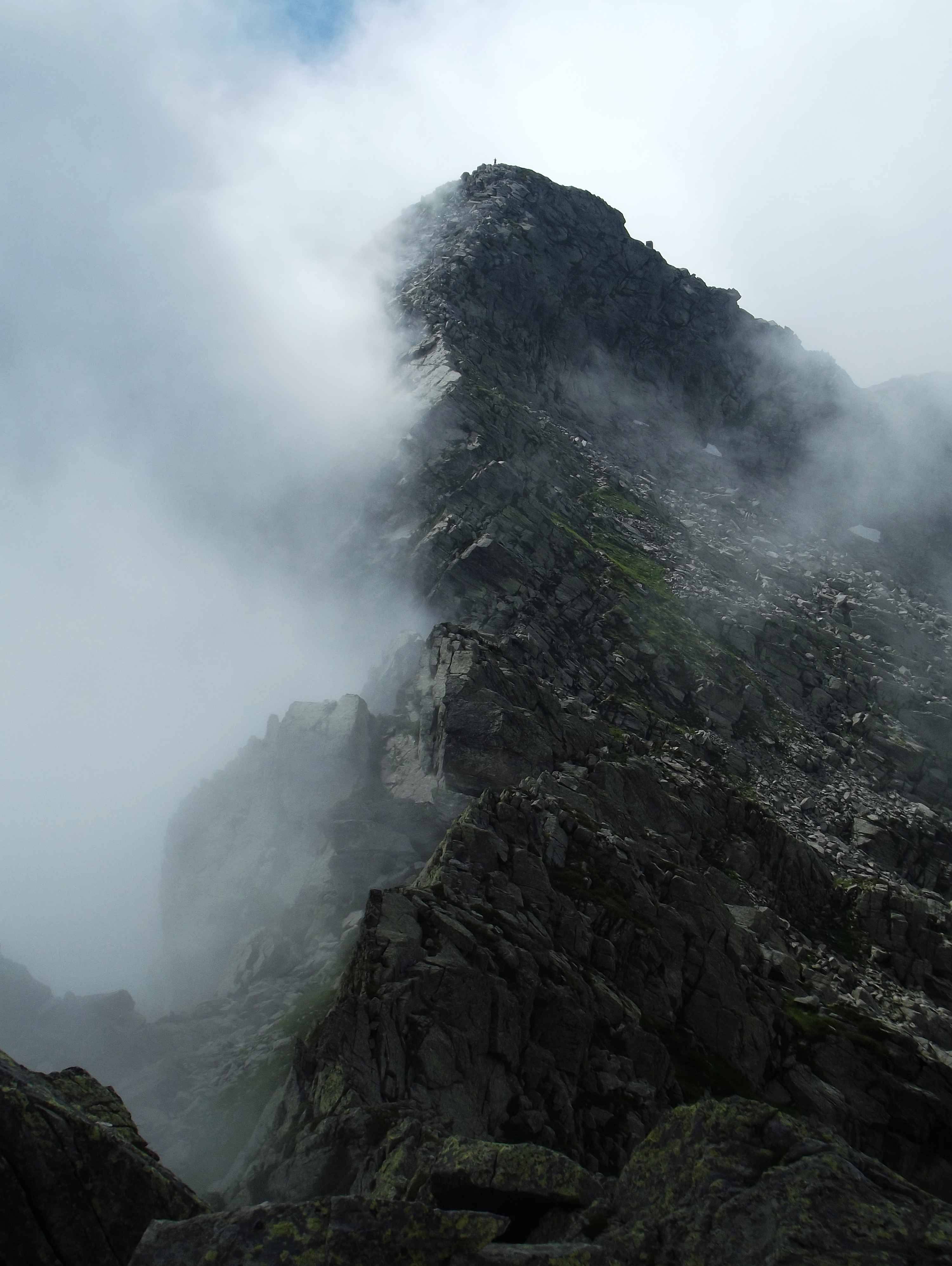 Cima di Bo (Alpi Biellesi): la cresta nord